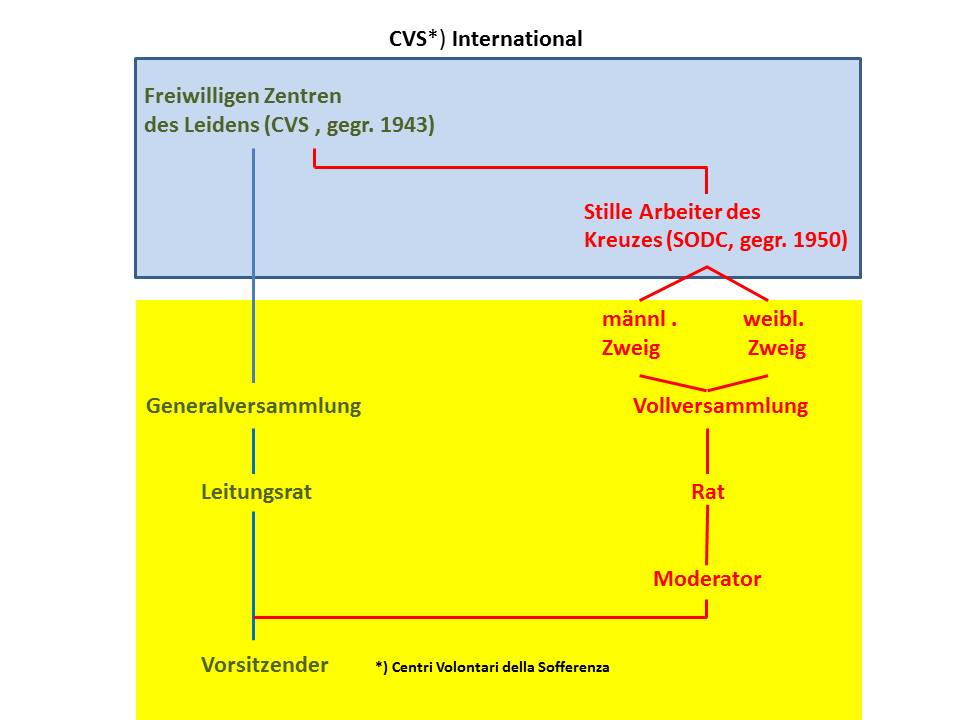 Organisationsübersicht zur "Confederazione CVS Internationale "